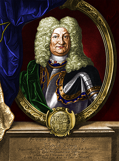 Digital kolorierte Darstellung eines Stiches von Bernhard Vogel (1683-1737). Dargestellt ist Friedrich Ludwig von Nassau-Ottweiler (* 3. November 1651 in Ottweiler; † 25. Mai 1728 in Saarbrücken). Er war von 1680 bis 1728 Graf von Ottweiler und von 1723 bis 1728 regierender Graf von Saarbrücken.